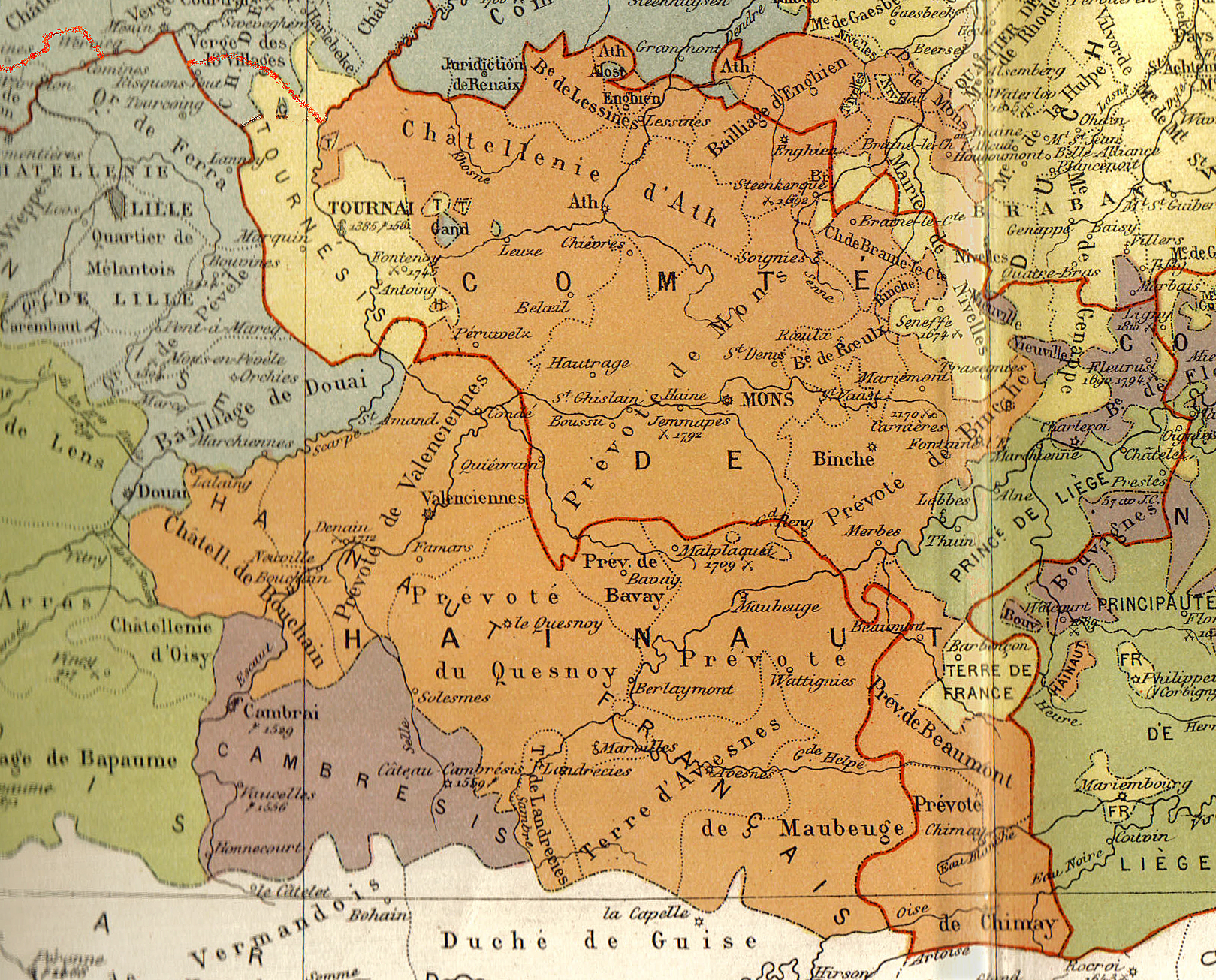 Mapa del comtat d'Hainaut